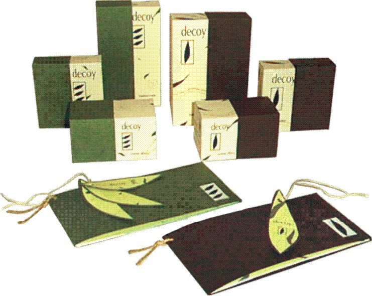 Obaly, vytvořené žáky a studenty SŠ a VOŠ obalové techniky, Štětí